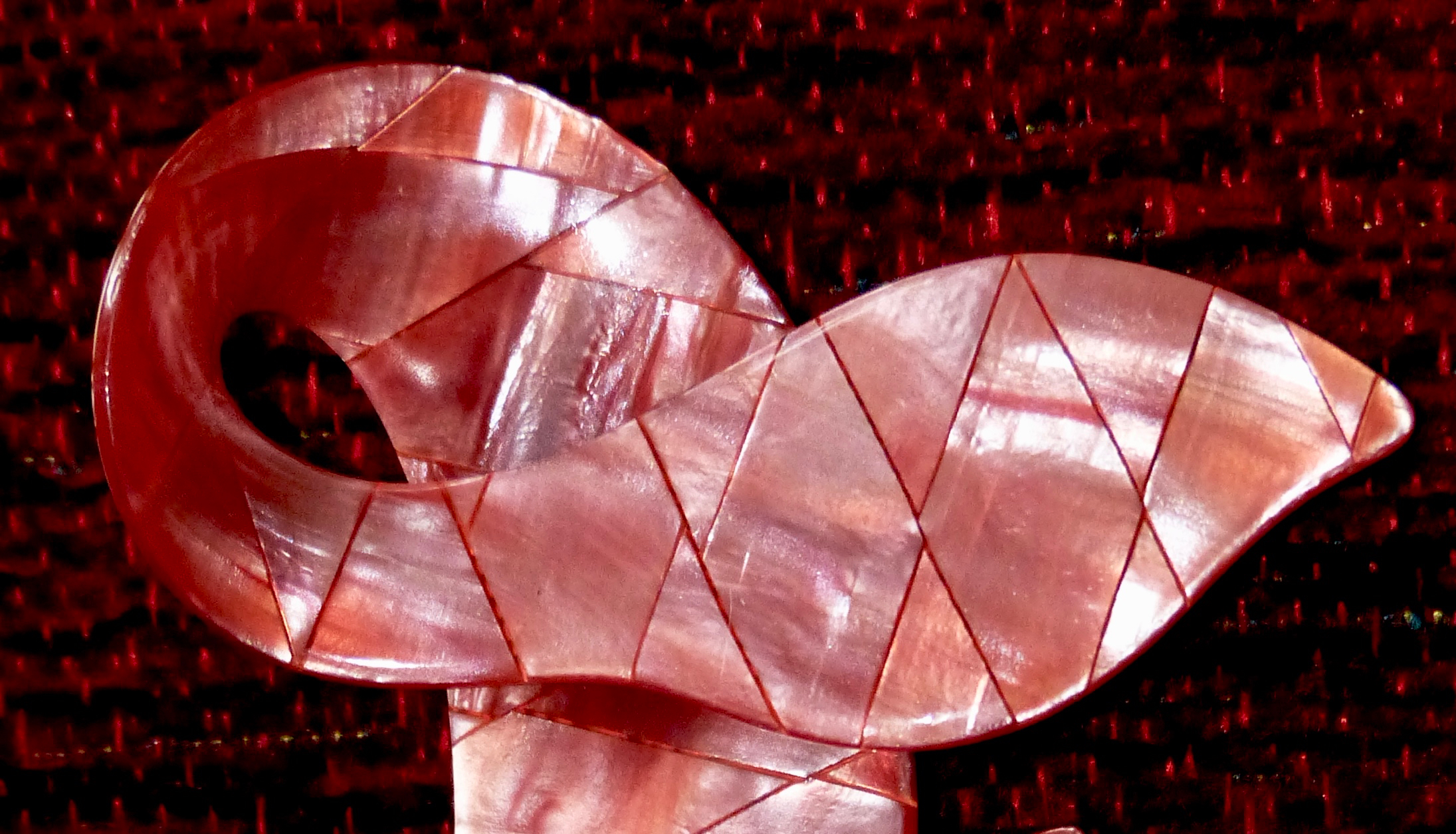 Laminiertes Celluloseacetat für die dreidimensionale Fuchs-Brosche von Léa Stein